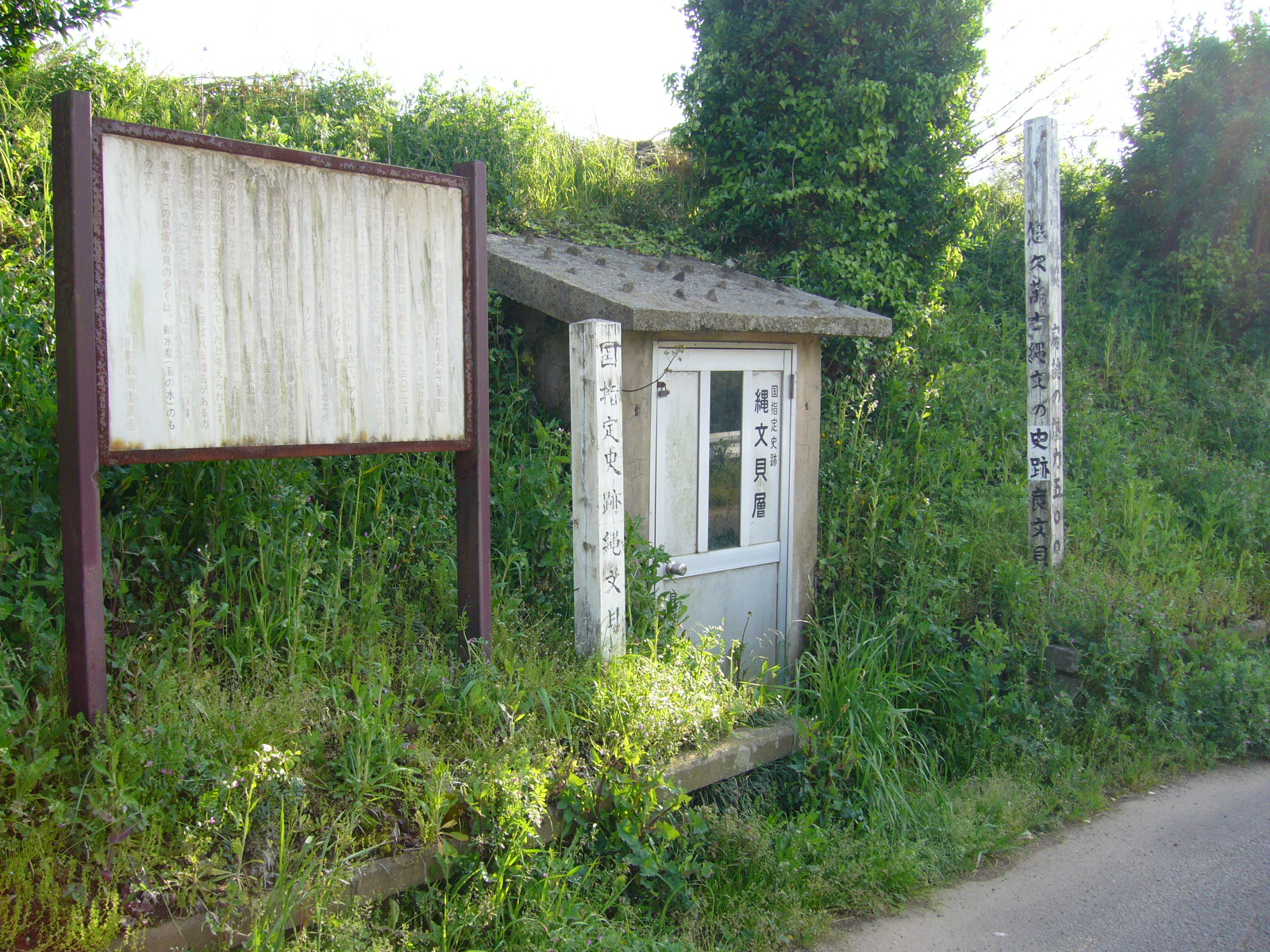 yoshibumi-shel-mound,katori-city,japan